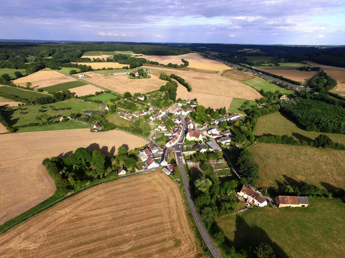 Prise de vue aérienne en drone prise le 10/08/2016 du Bourg de Saint Bomer